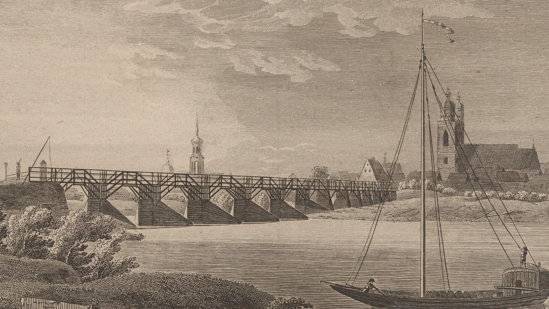 Ansicht der 1787 neu erbauten Elbbrücke in Wittenberg um 1788 - Bildbeschnitt auf zentrale Bildteile. Die Strompfeiler sind flussaufwärtig verstärkt und sollten im Winter eisbrechend wirken; diese Funktion findet auch in den Konstruktionszeichnungen Erwähnung, siehe u.a. [1]. Die Vorlandpfeiler besaßen keine solche Verstärkung.